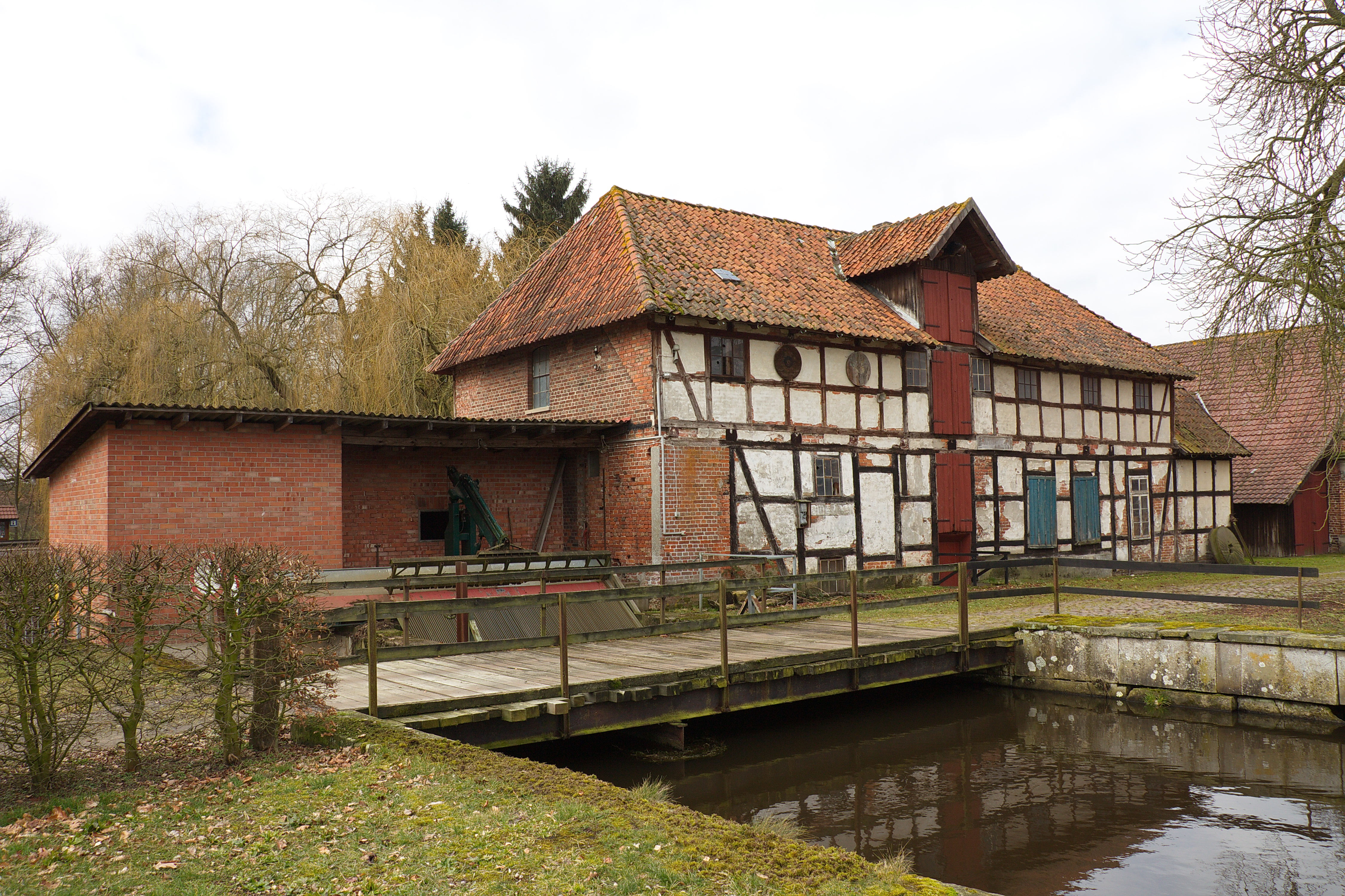 Wassermühle auf dem Rittergut Böhme in Böhme, Niedersachsen, Deutschland